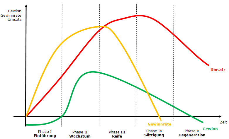 markt-politisches Konzept